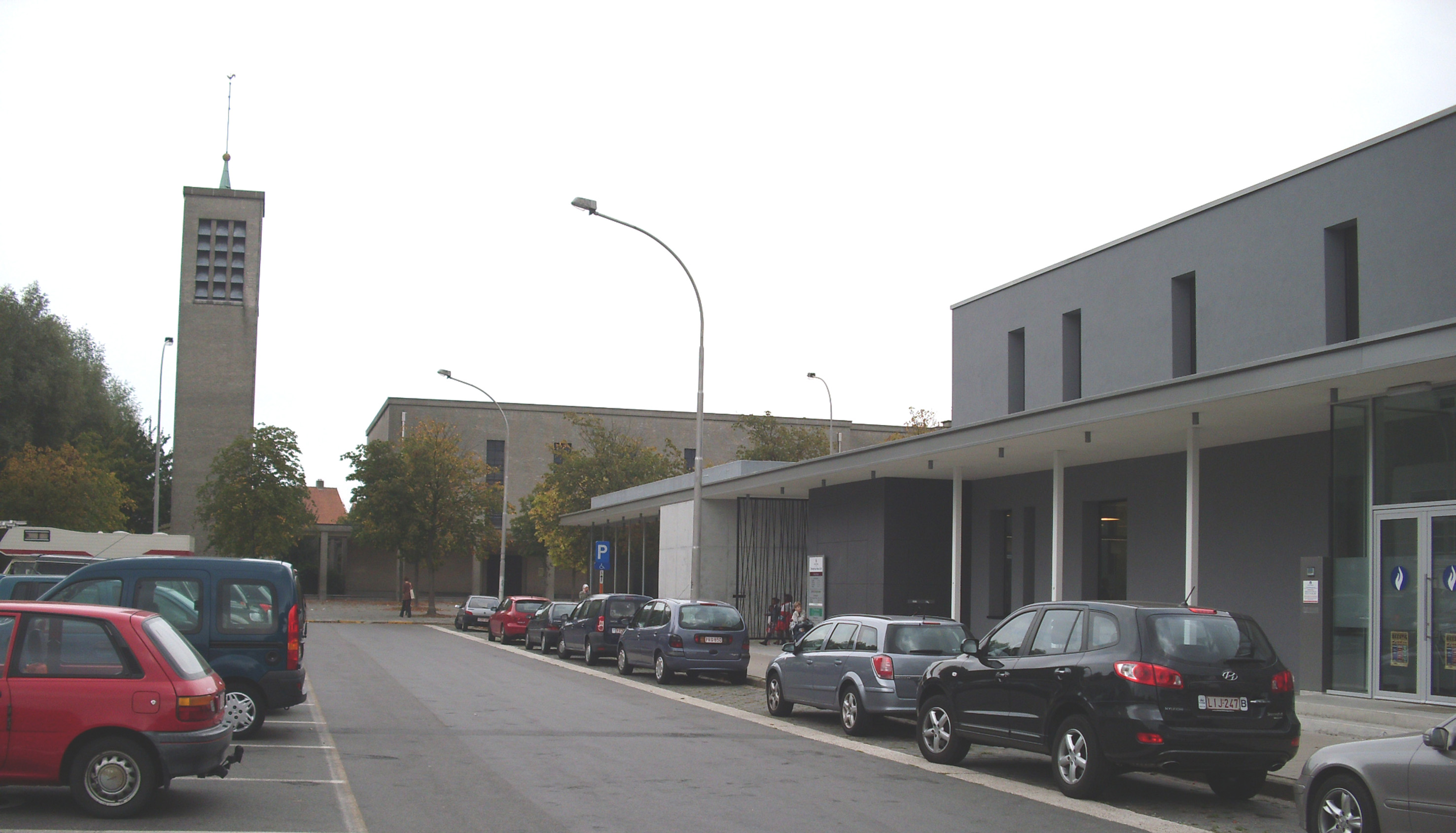 Rerum Novarumplein - Nieuw Gent - Gent - Oost-Vlaanderen - Vlaanderen - België